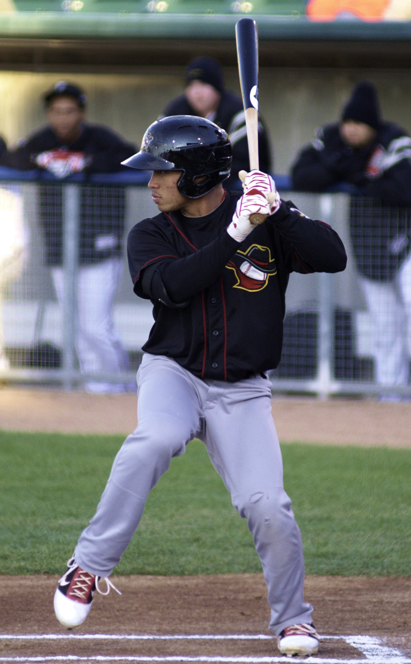 Kolten Wong